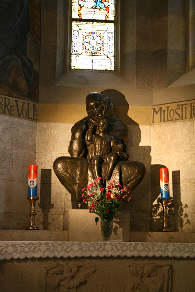 Hrvatska bogorodica u crkvi svetog Marka